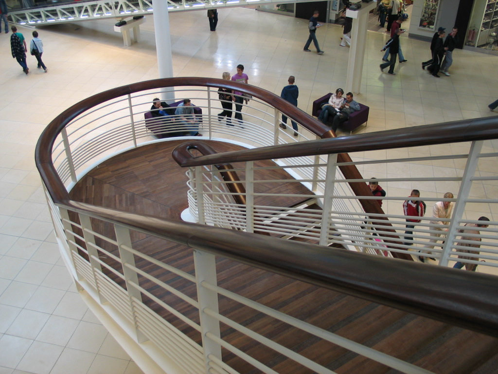 Centrum Manufaktura